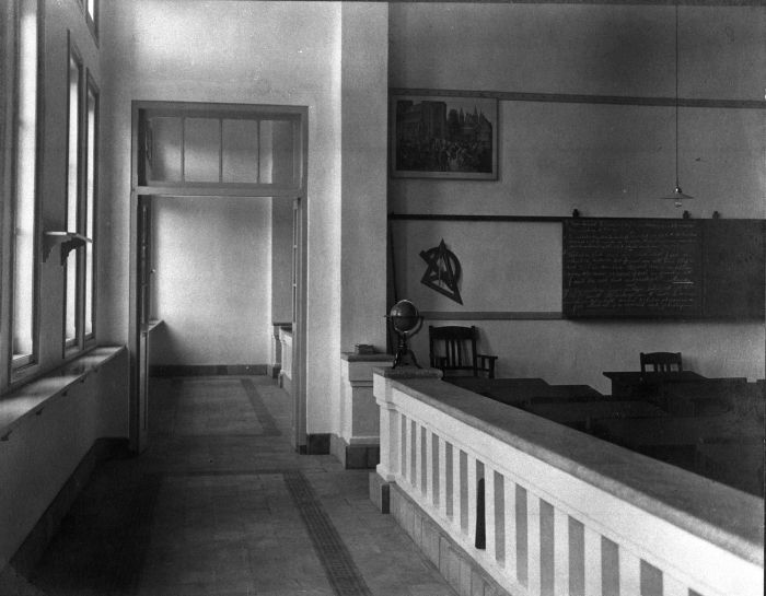 Foto. Gang en een klaslokaal in het schoolgebouw van de Neutrale Lagere School, Malang